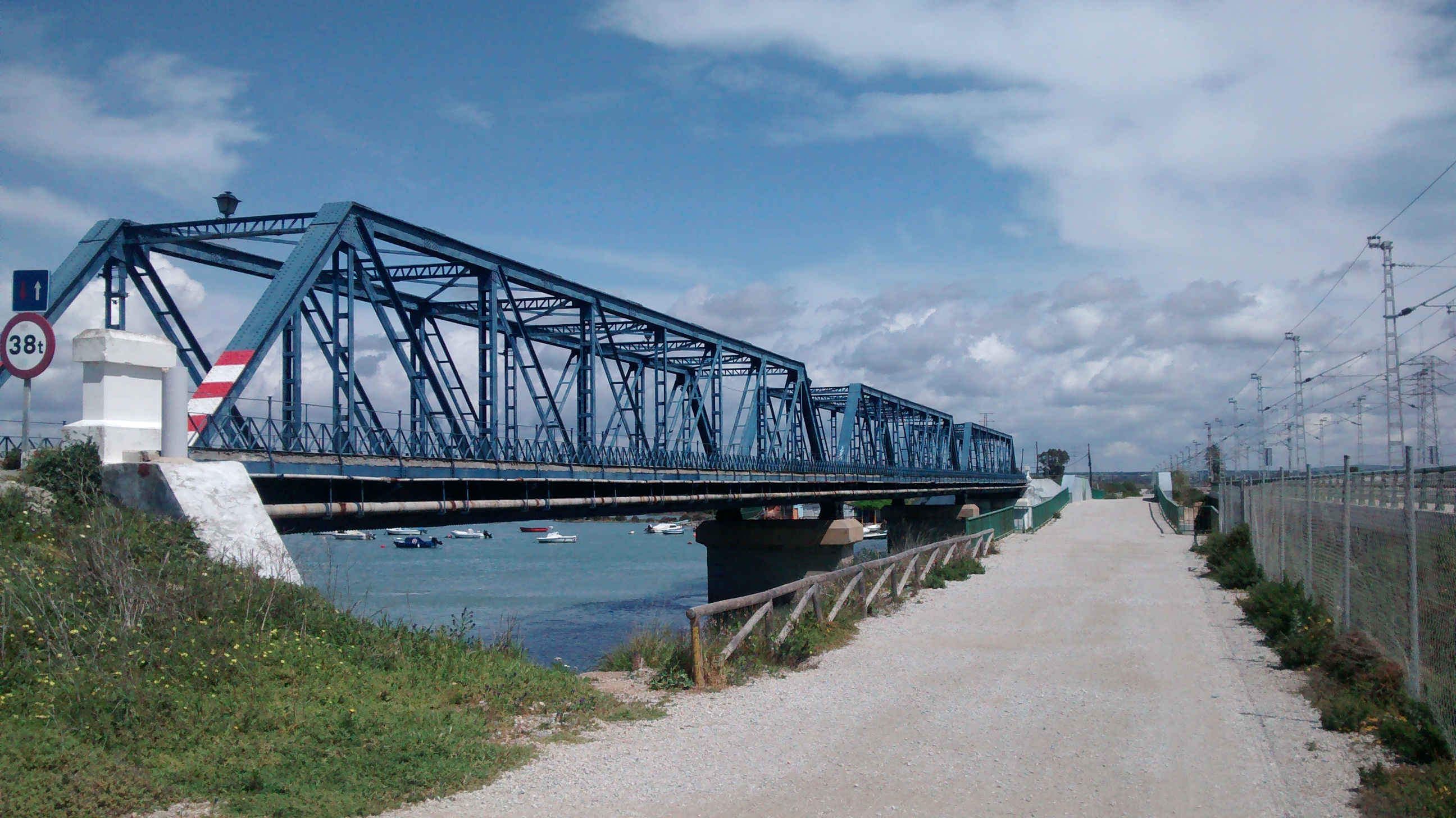 Puente de hierro de acceso al Arsenal de la Carraca en San Fernando